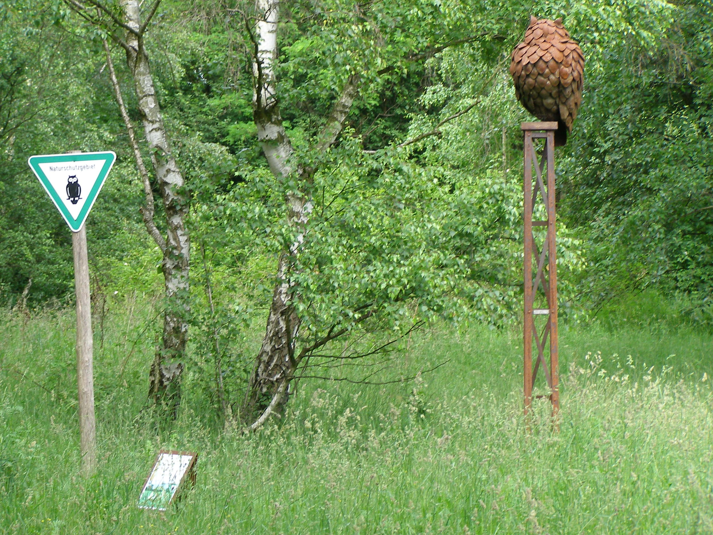 Natur-Park Schöneberger Südgelände, Berlin, Zwei Naturschutz-Eulen